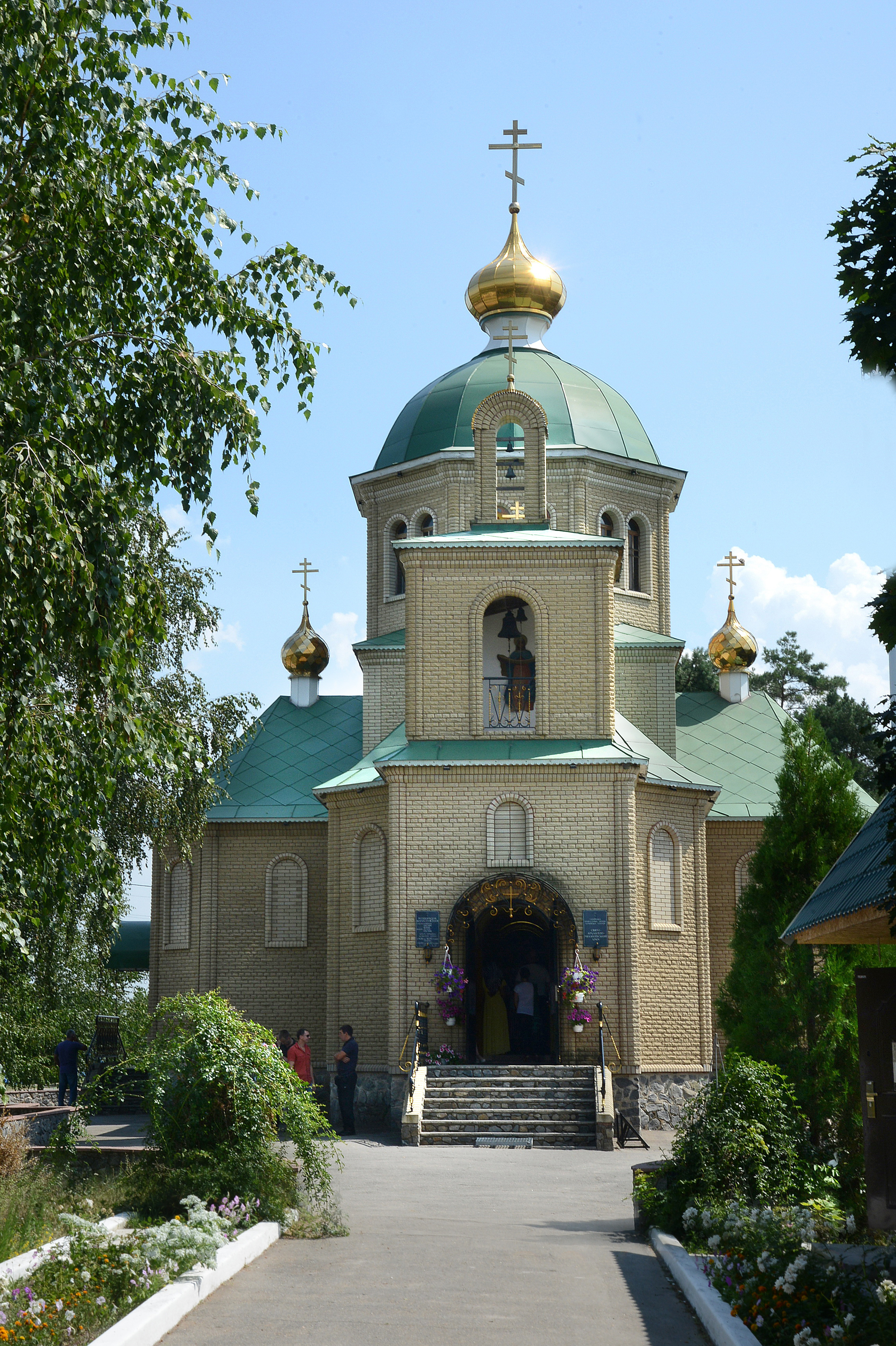 Зачепиловка, Свято-Архангело-Михайловский храм , фото Чуприна Вадим